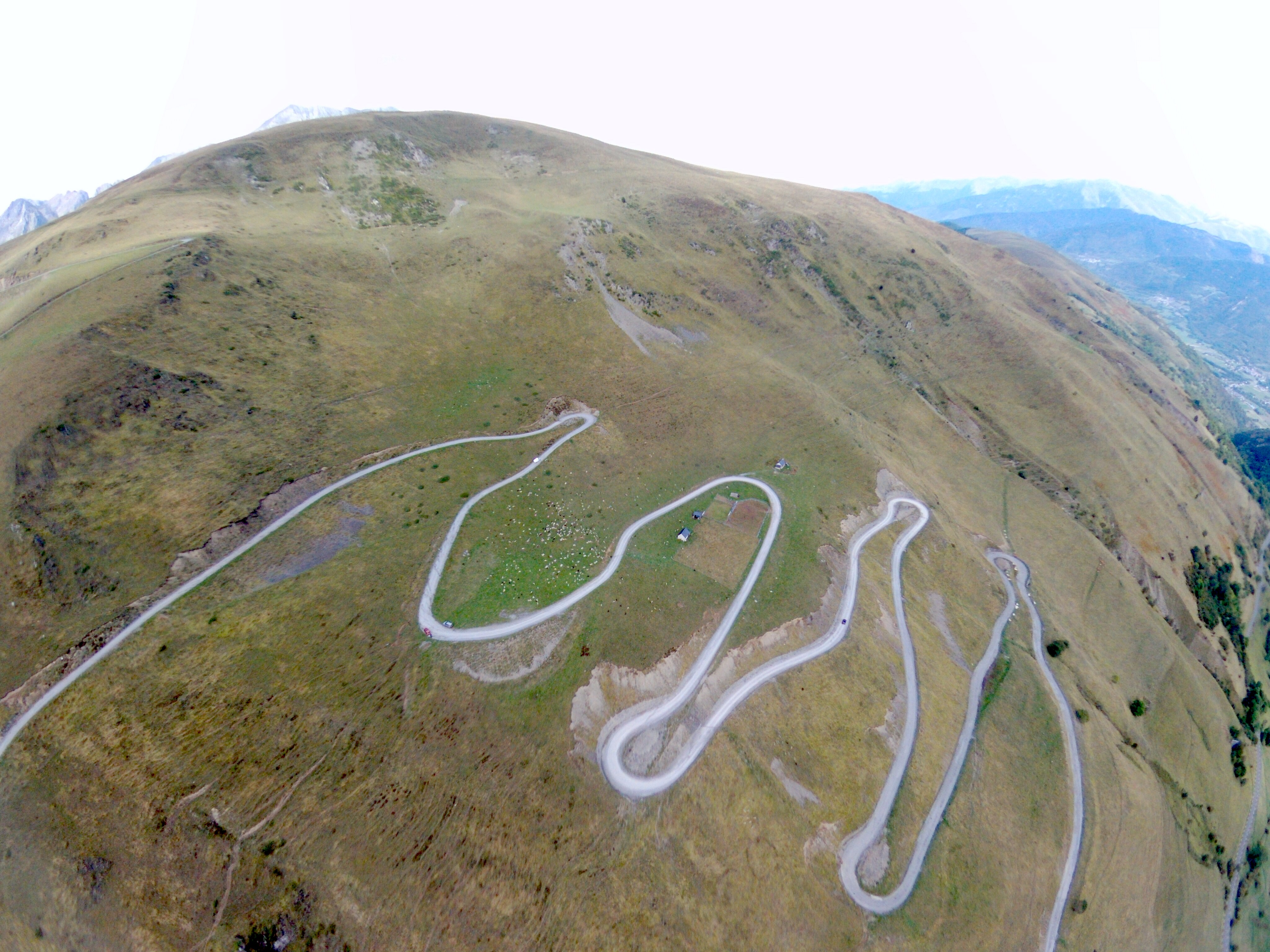 les dernières épingles de l'ascension du col du portet